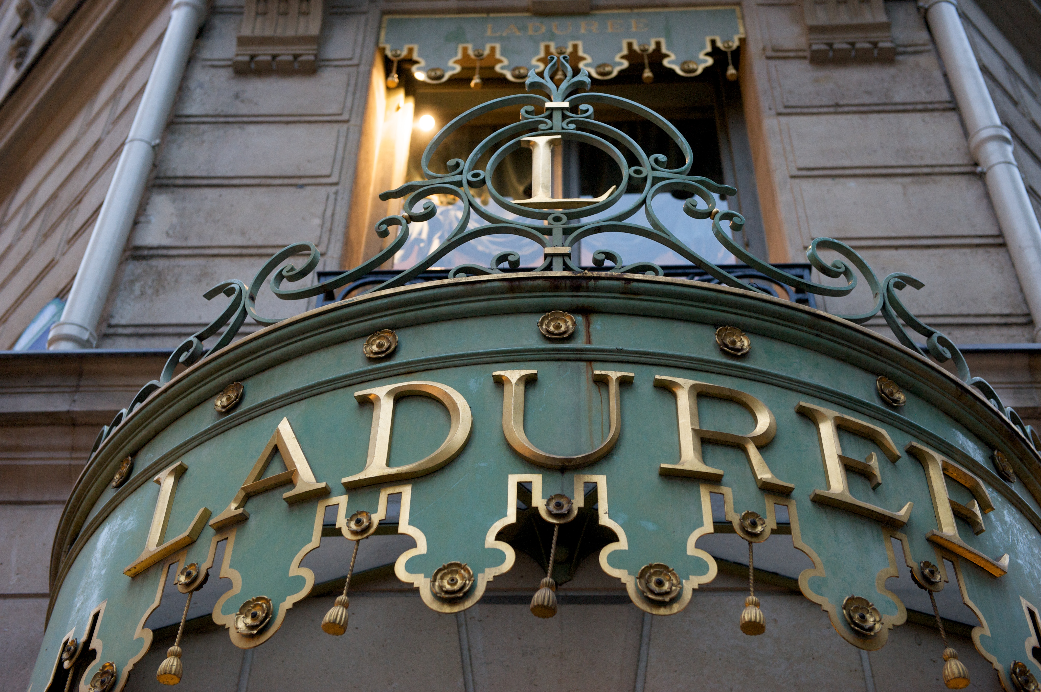 Ladurée, Champs-Élysées 2009.